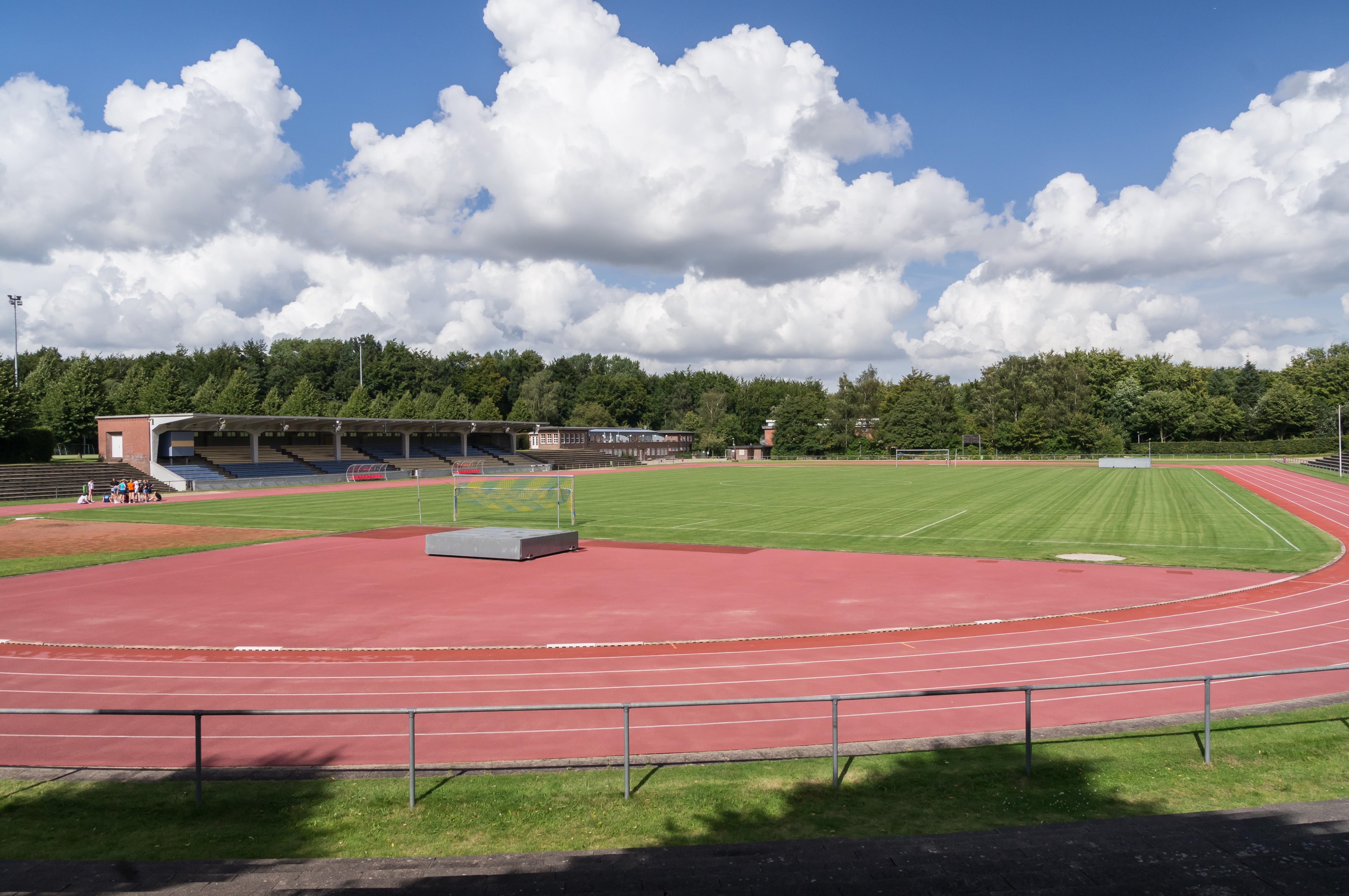 Flensburg-Fruerlund: Arndstrasse 5; Stadion - Kampfbahn mit Tribünengebäude und Sitzstufen; Denkmal-Nr. 3,1